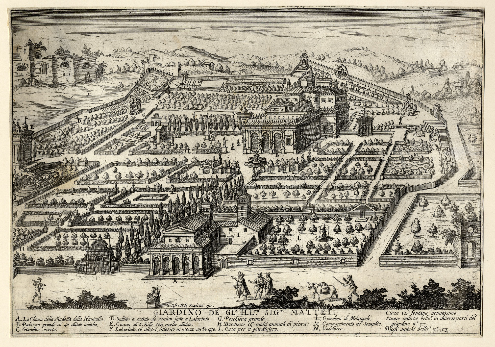 Rom, Giardinio de … Sign. Mattei (Villa Celimontana), Kupferstich, nach 1600